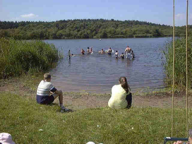 Swimming in Hatchmere Lake